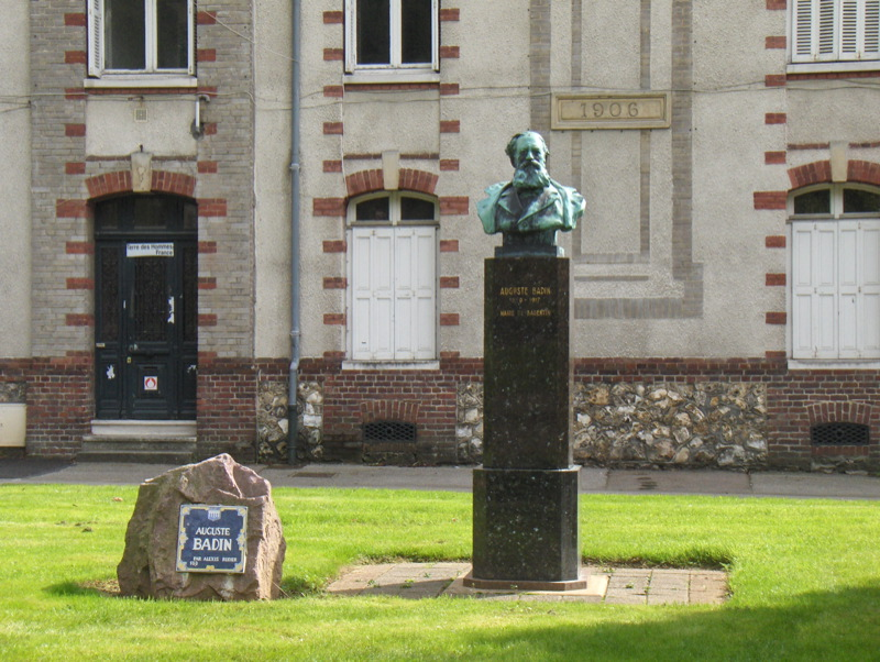 Cités ouvrières Badin à Barentin (Seine-Maritime). La statue du patron bienfaiteur sur la pelouse devant l'école.